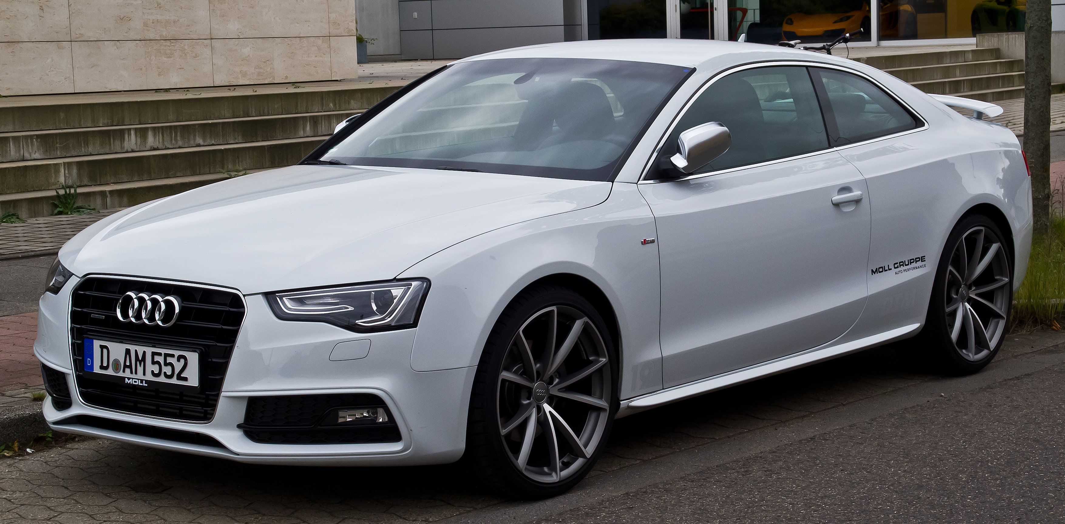 Audi A5 Coupé quattro DTM Champion (Facelift)